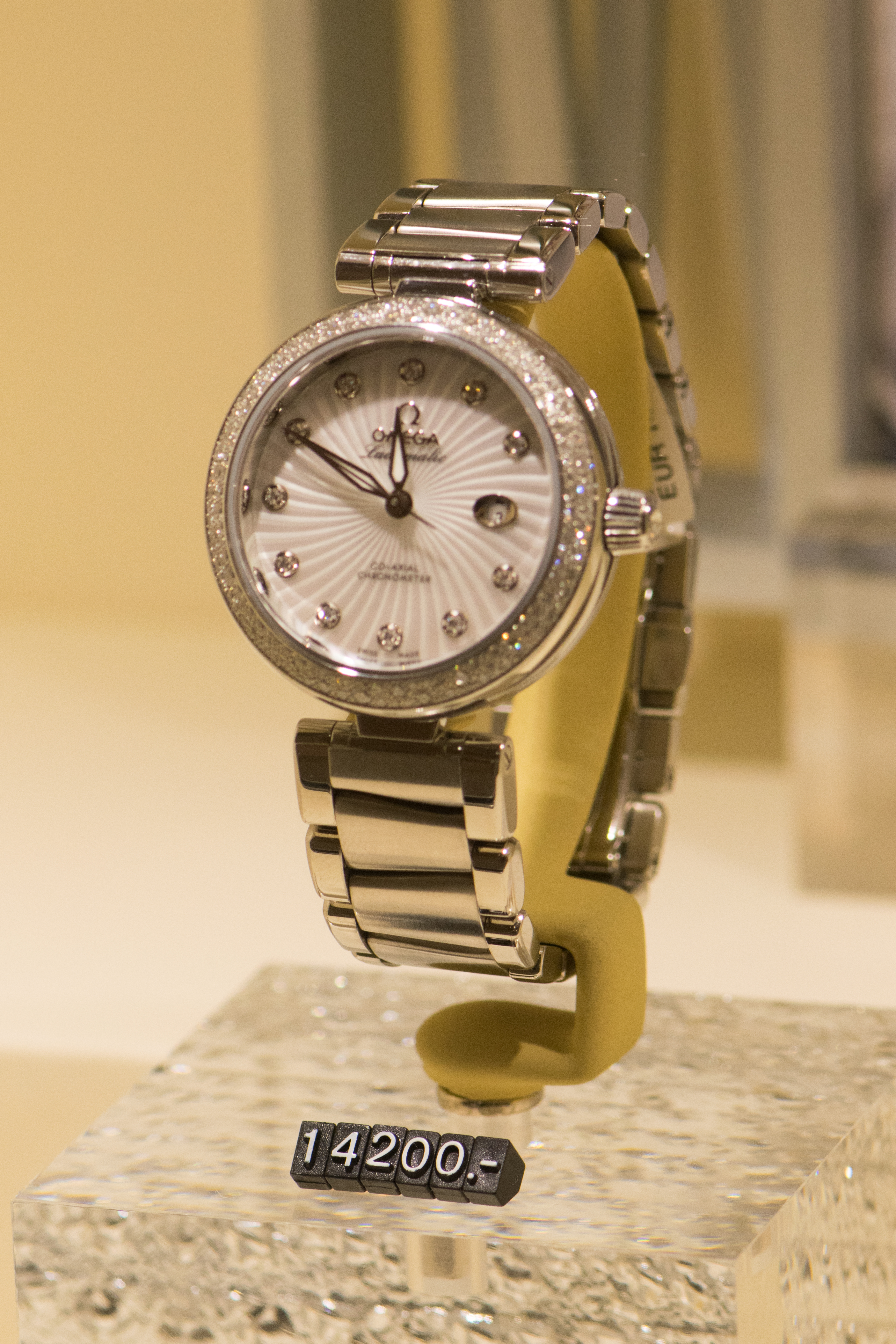 Amsterdam, 2017